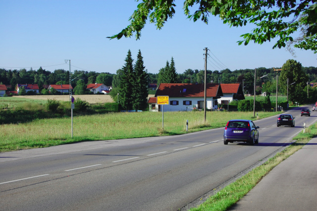 Baierbrunn: B11 am Ortsausgang Richtung Buchenhain